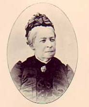 Friederike von Hohezollern-Sigmaringen, Marchesa Pepoli (1820-1906)